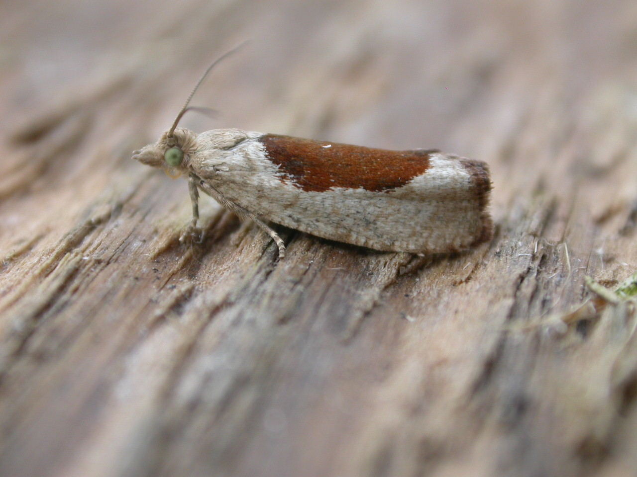 Epinotia solandriana, Touquin, Seine-et-Marne, N France, 25/26 June 2003